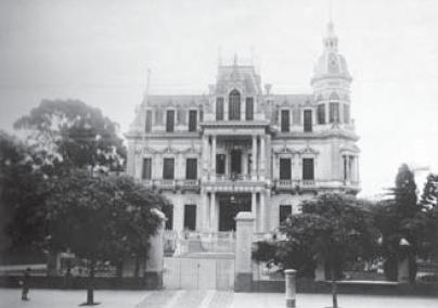 Palacio Videla Dorna en 1899. Buenos Aires.